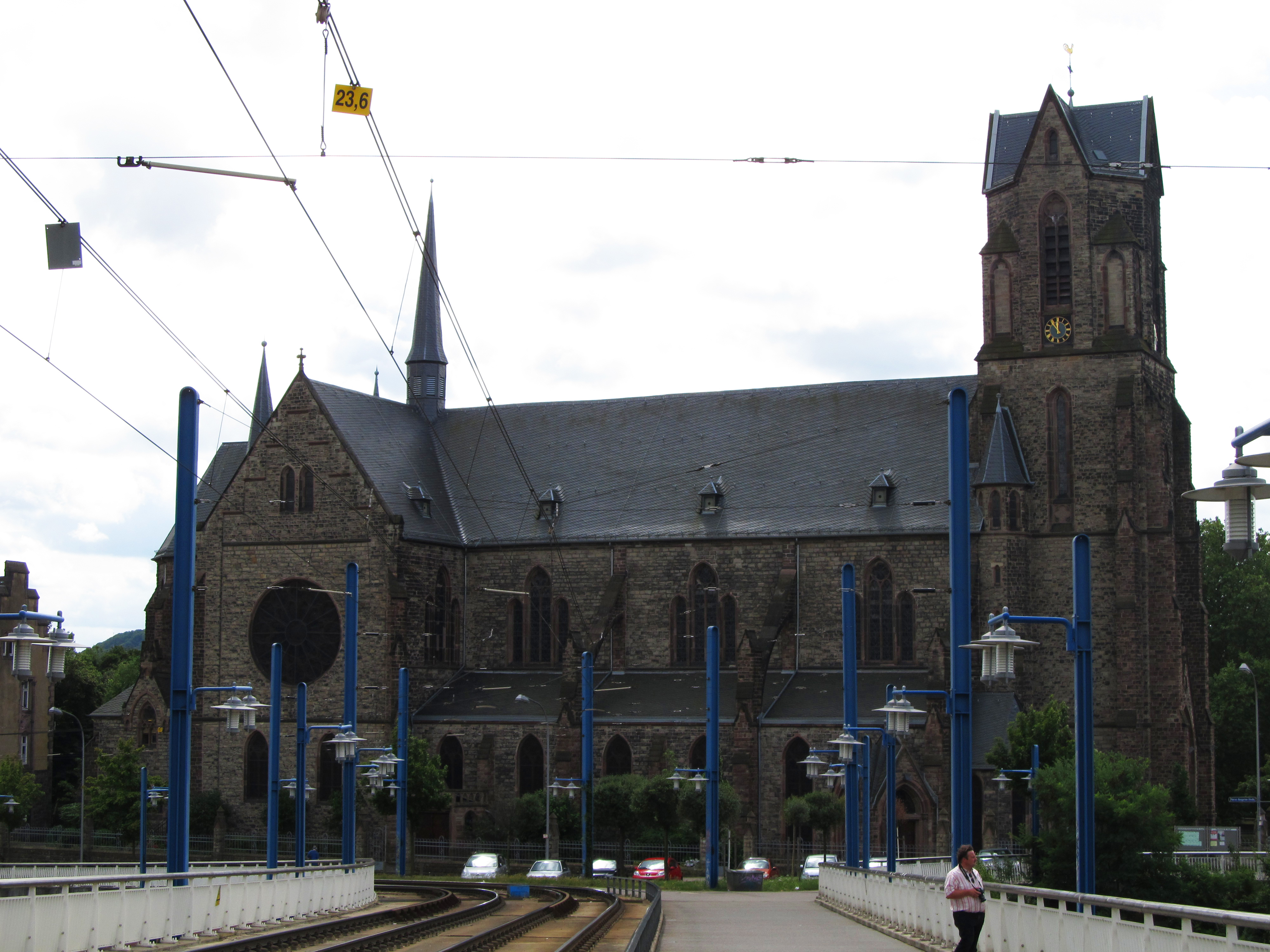 Die katholische Pfarrkirche St. Josef in Saarbrücken-Malstatt, Saarland